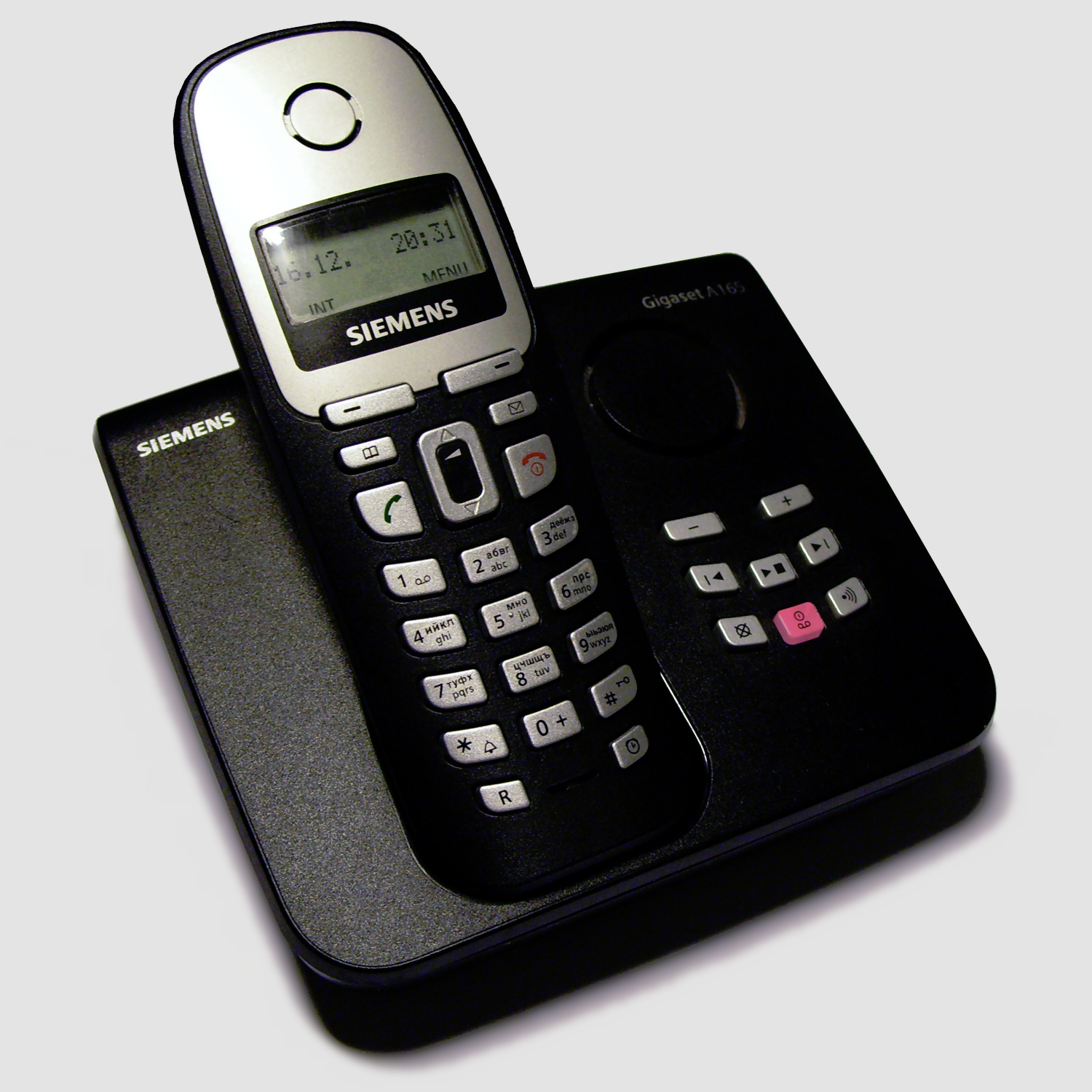 Радиотелефон Siemens Gigaset A165.